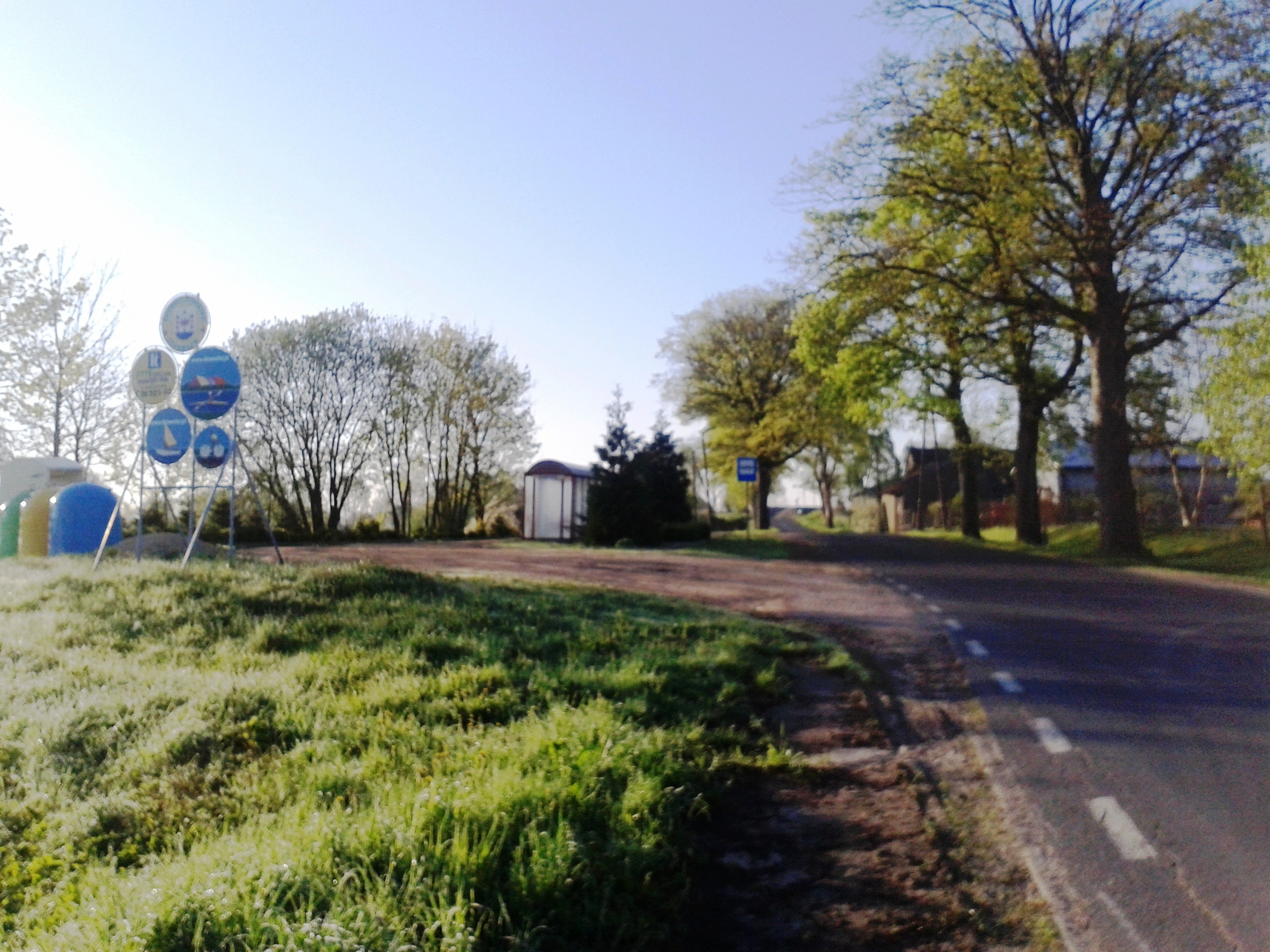 Widok na Zagozd - wjazd o strony Łobza